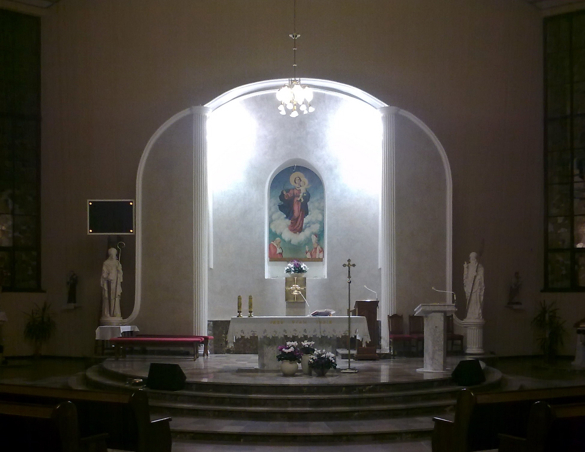 Kościół Matki Boskiej Zwycięskiej w Bydgoszczy - ołtarz